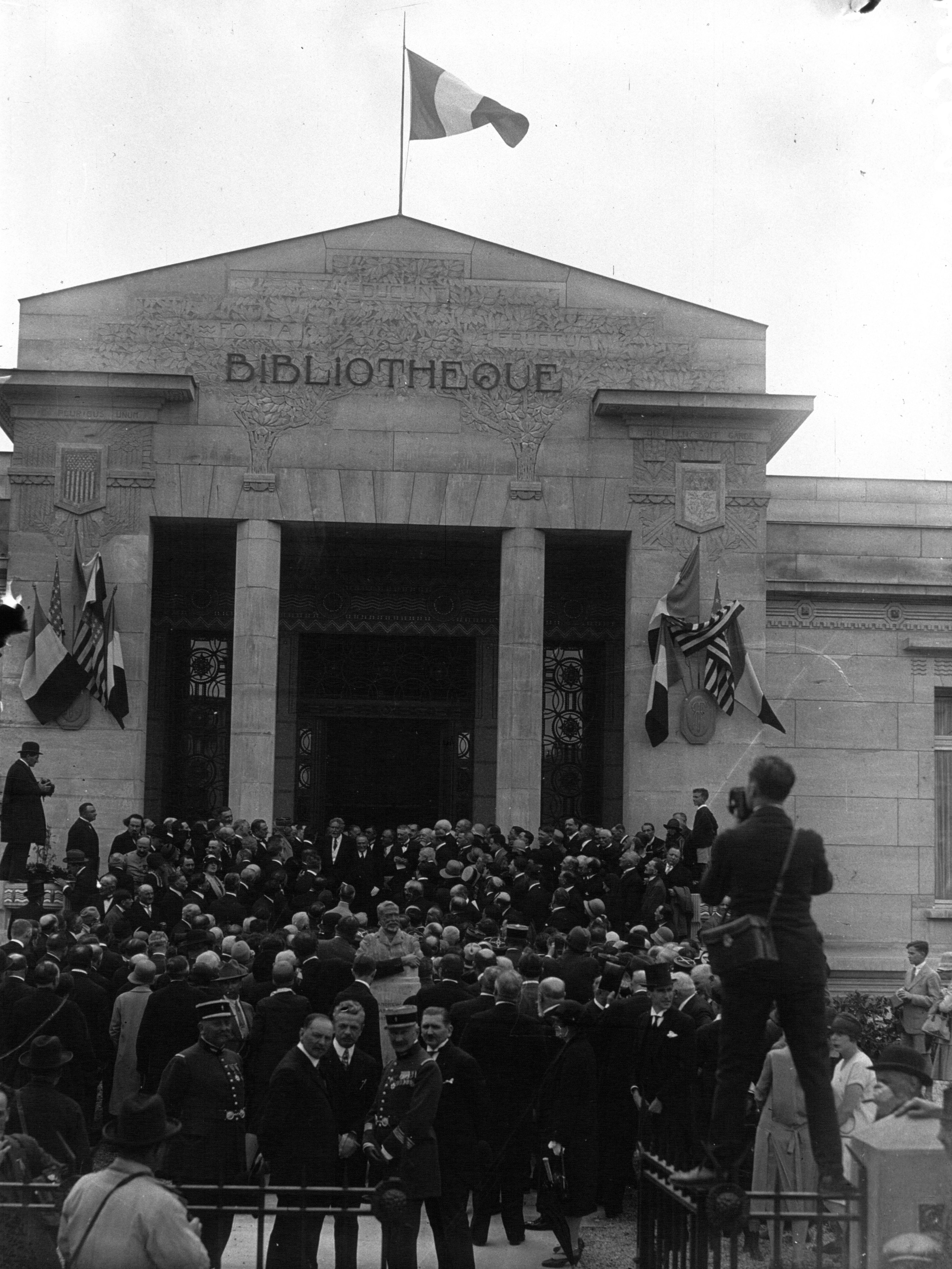 Inauguration de la Bibliothèque de Reims par Myrron Herrick et Doumergue.